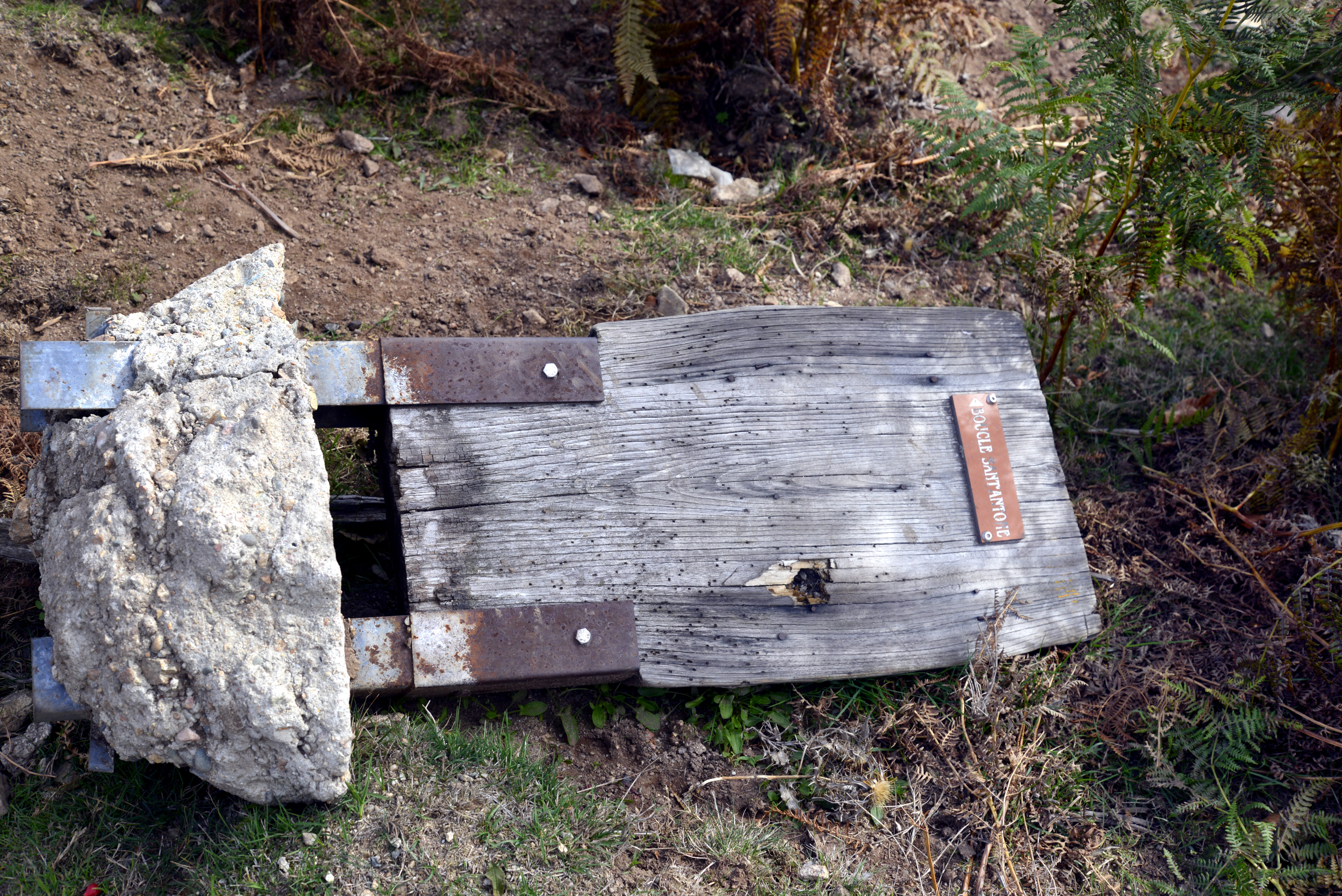 Tavera, Gravona (Corse) - Panneau du sentier « Boucle Sant' Antone » à terre au col de Scalella.